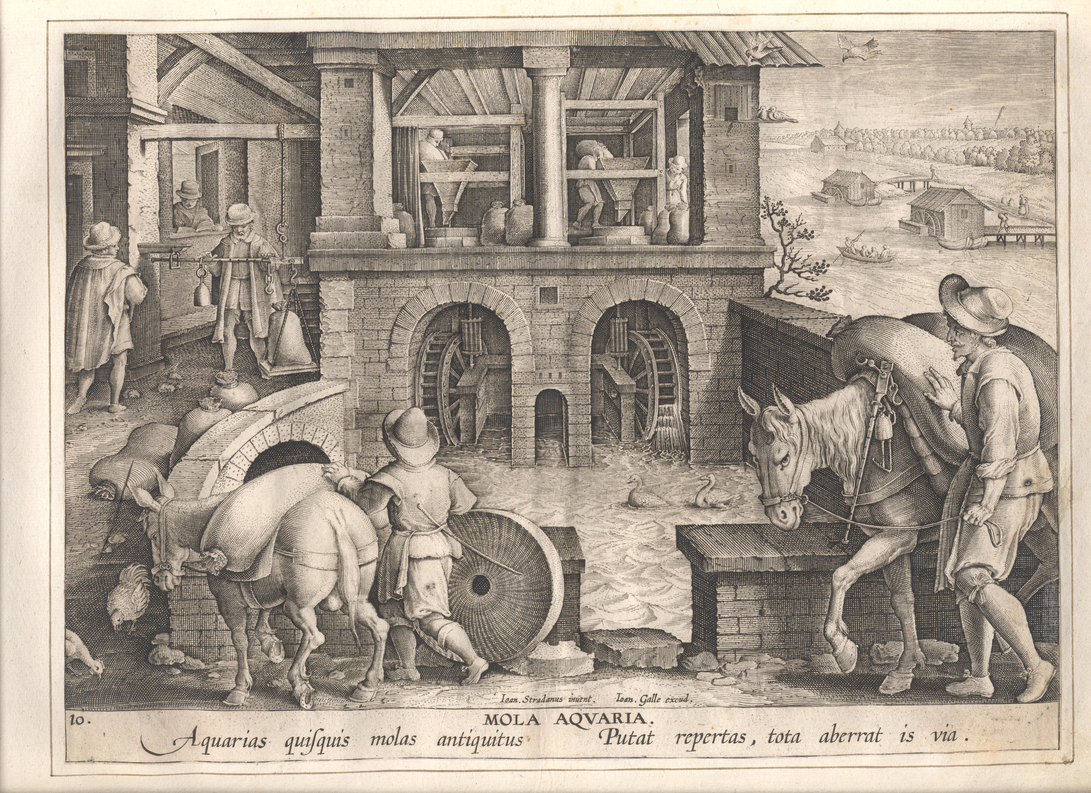 anonymous: The invention of the watermill Artist anonymousDesigner Stradanus (1523–1605) Alternative names Jan van der Straet, Giovanni della Strada, Johannes della Strada, Giovanni Stradano, Johannes Stradano, Giovanni Stradanus, Johannes Stradanus, Jan van Straeten, Jan van StratenDescriptionFlemish painter and draughtsmanDate of birth/death 1523 2 November 1605 Location of birth/death Bruges FlorenceWork location Antwerp (1545), Florence (circa 1550-1605), Rome (circa 1550-1553), Montemurlo (1590)Authority control : Q143595 VIAF: 29699451 ISNI: 0000 0000 8108 906X ULAN: 500011304 LCCN: n84804240 NLA: 35875335 WorldCat creator QS:P170,Q143595 Title De uitvinding van de watermolenPublisher Jan Galle Object type engraving Description Gravure , anoniem, Museum Plantin-MoretusMedium gravureCollection Museum Plantin-Moretus Native nameMuseum Plantin-MoretusLocationAntwerpCoordinates51° 13′ 05.86″ N, 4° 23′ 53.39″ E Established1877 Web page control : Q595802 VIAF: 130668175 ISNI: 0000 0001 2285 9666 LCCN: n50051109 UNESCO: 1185 GND: 1007736-4 WorldCat institution QS:P195,Q595802Accession number PK OPB 0186 011References described at URL: Source/Photographer Museum Plantin-Moretus Native nameMuseum Plantin-MoretusLocationAntwerpCoordinates51° 13′ 05.86″ N, 4° 23′ 53.39″ E Established1877 Web page control : Q595802 VIAF: 130668175 ISNI: 0000 0001 2285 9666 LCCN: n50051109 UNESCO: 1185 GND: 1007736-4 WorldCat institution QS:P195,Q595802Permission(Reusing this file) This file is made available under the Creative Commons CC0 1.0 Universal Public Domain Dedication. The person who associated a work with this deed has dedicated the work to the public domain by waiving all of their rights to the work worldwide under copyright law, including all related and neighboring rights, to the extent allowed by law. You can copy, modify, distribute and perform the work, even for commercial purposes, all without asking permission. Gravure , anoniem, Museum Plantin-Moretus